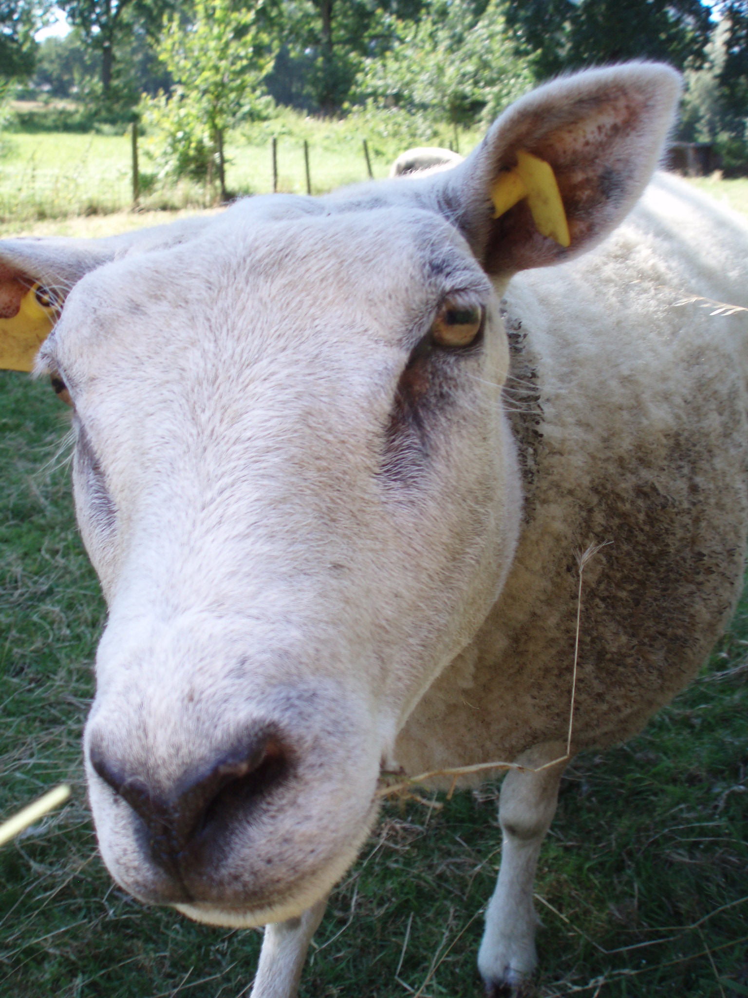 Ear tagged sheep, Malden, Netherlands